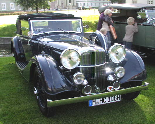 1930s Alvis 4.3 litre